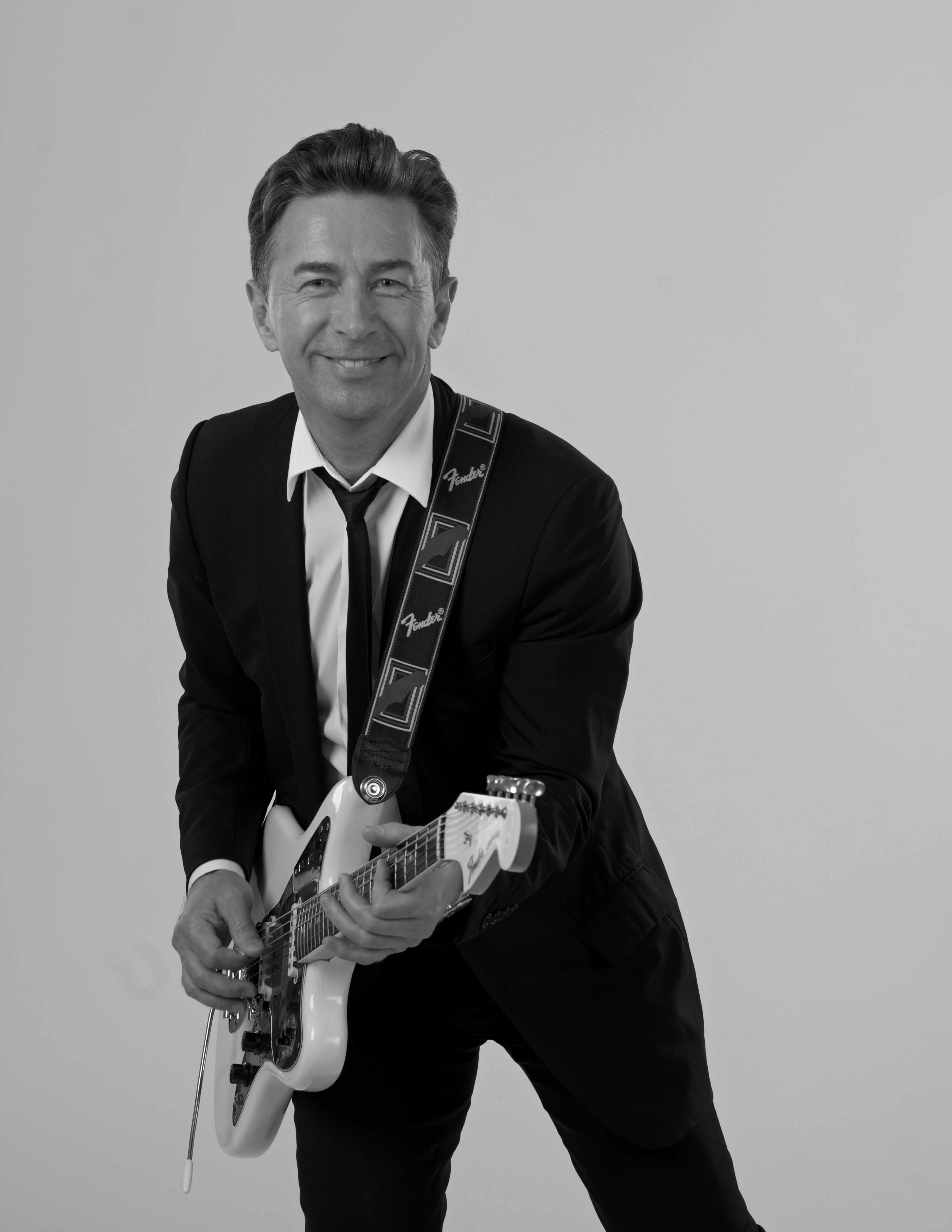 Валерий Сюткин